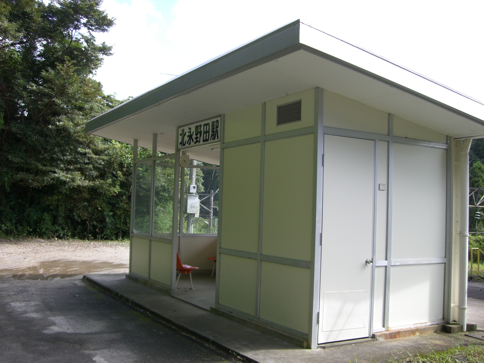 北永野田駅